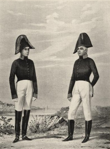 Гвардейский и Армейский Денщики, 1802-1812. Это изображение было также использовано для иллюстрирования статьи «Денщики» опубликованной в девятом томе «Военной энциклопедии», который был издан книгоиздательским товариществом И. Д. Сытина в 1912 году в столице Российской империи городе Санкт-Петербурге.